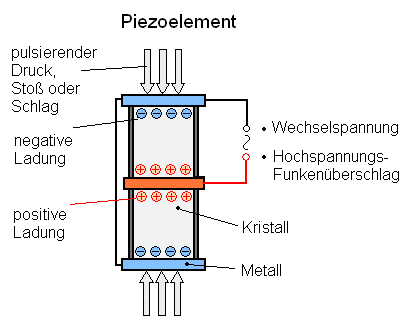 Piezoelement Sonstiges